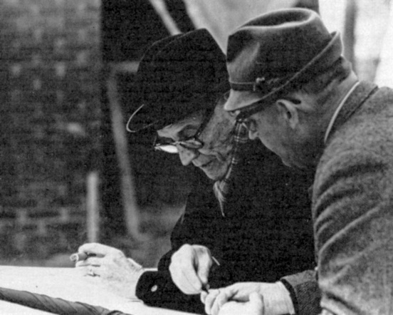 Sigurd Lewerentz (vänster) på byggarbetsplatsen för Petrikyrkan ca 1963.